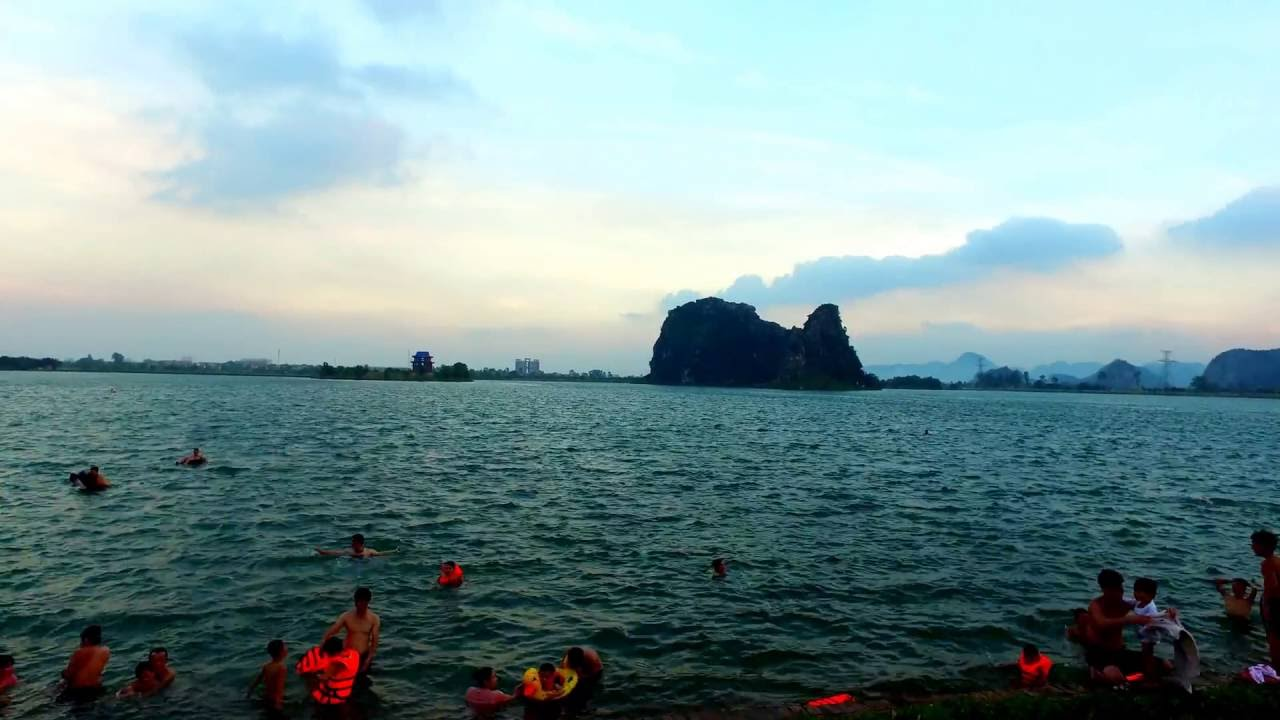 Danh thắng núi Lớ, hồ Cá Voi ở công viên văn hóa Tràng An, Ninh Bình